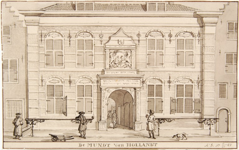 Mint, Dordrecht, Netherlands (1749)